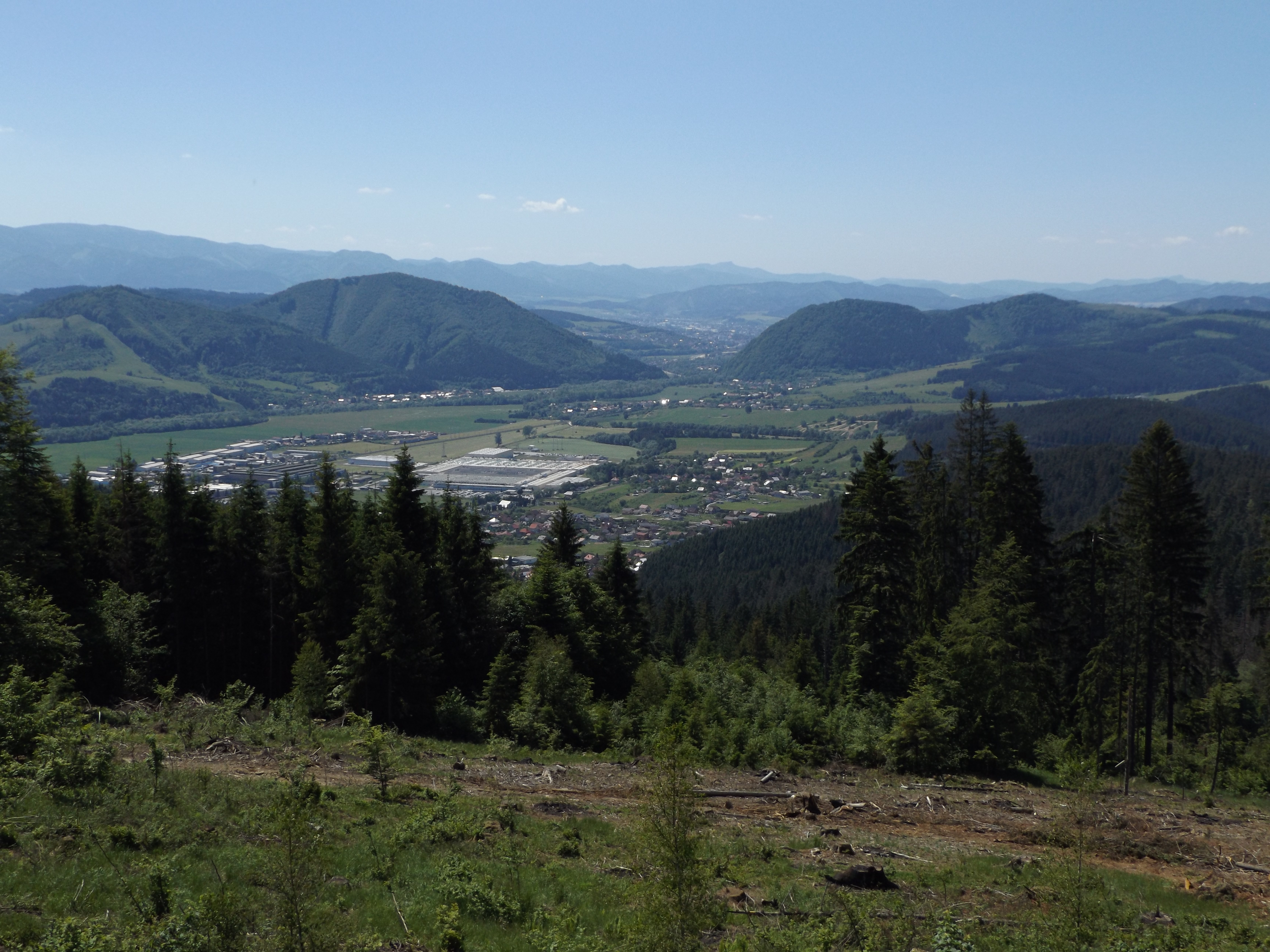 Kysucká brána, pohľad z rozhľadne Tábor, jún 2017